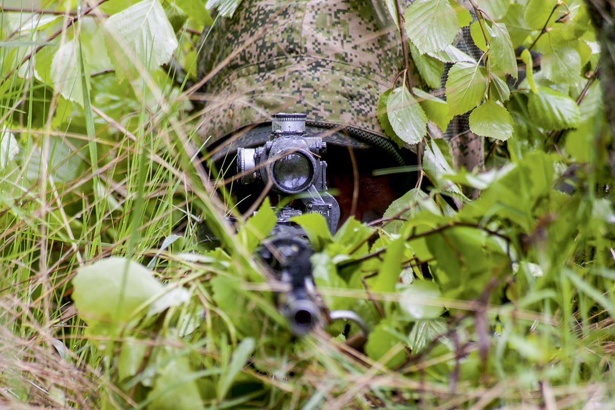 Тренировка разведчиков ЗВО в Тамбове.